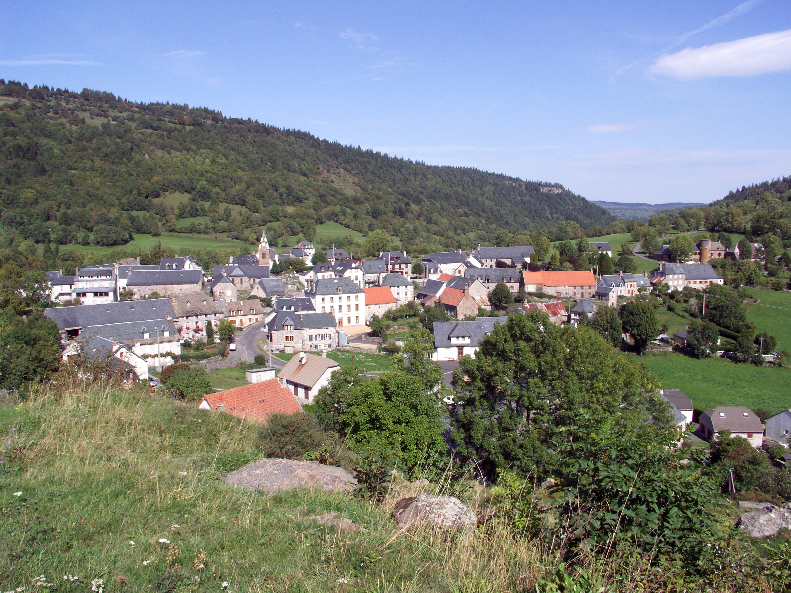 Albepierre-Bredons: village situé dans le département français du Cantal.